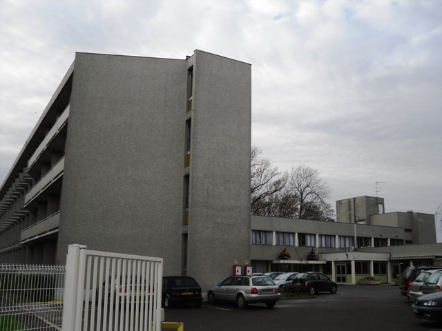 La maison de retraite intercommunale Charaintru de Savigny-sur-Orge (91)